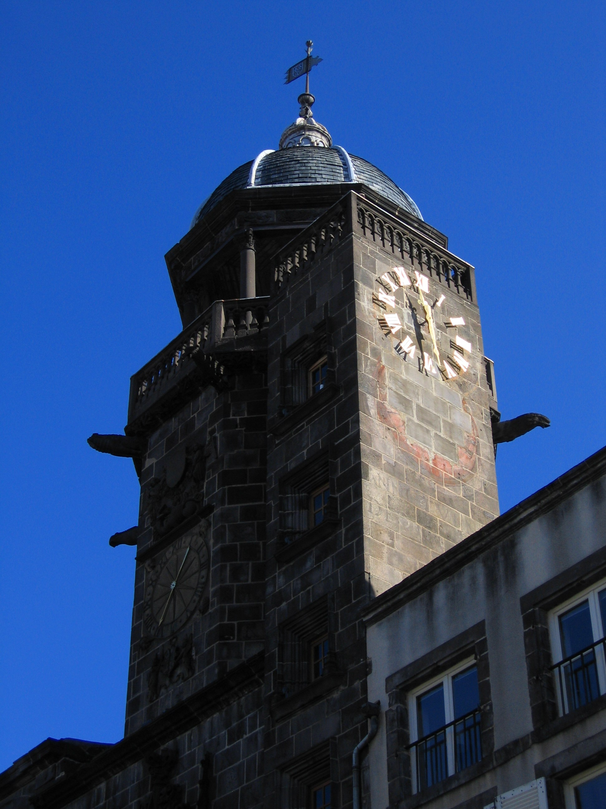 La tour de l'Horloge (ville de Riom, Puy-de-Dôme, région Auvergne). Auteur : Jean-Marc Aubelle